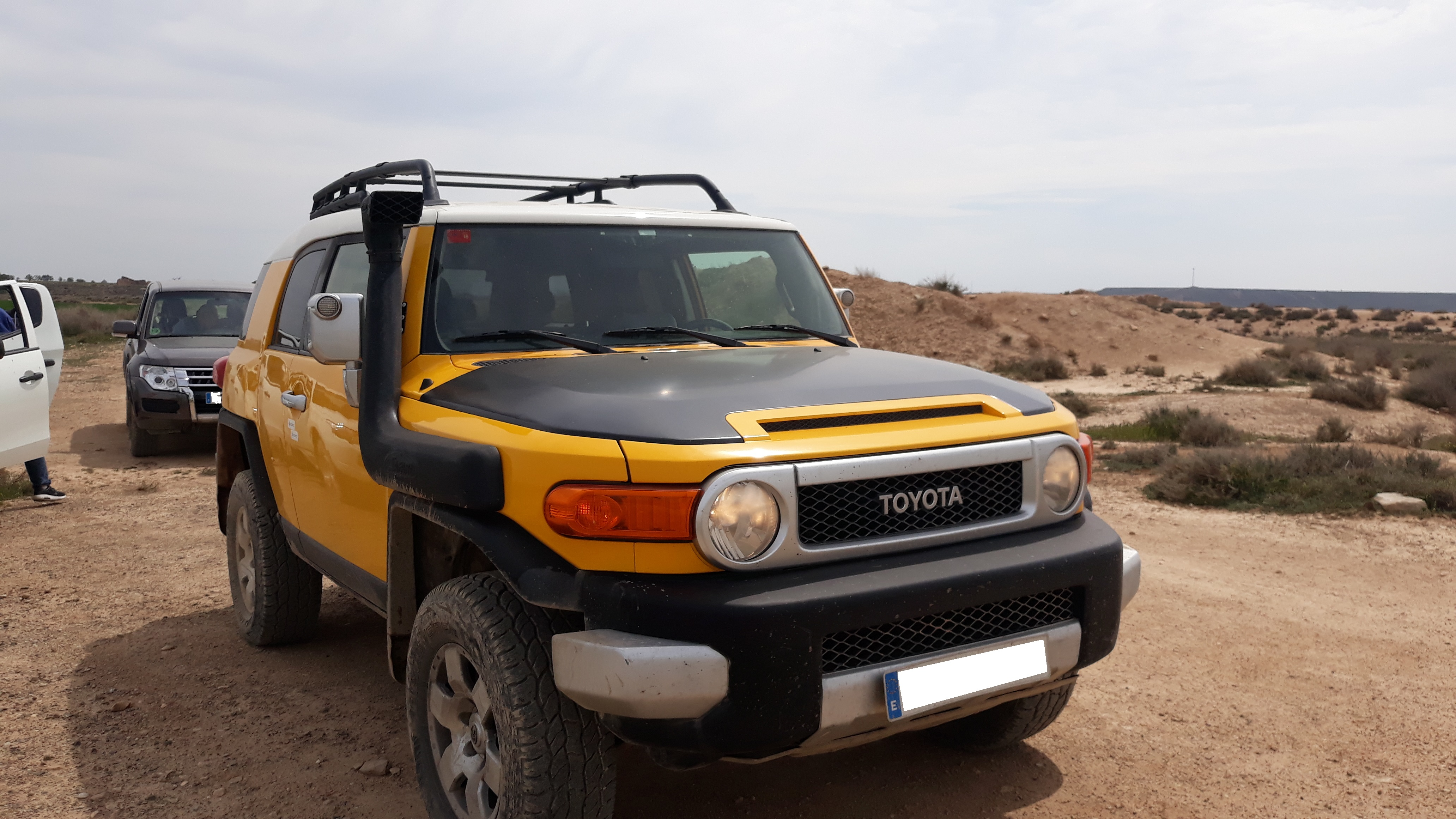 Toyota FJ Cruiser en los Monegros